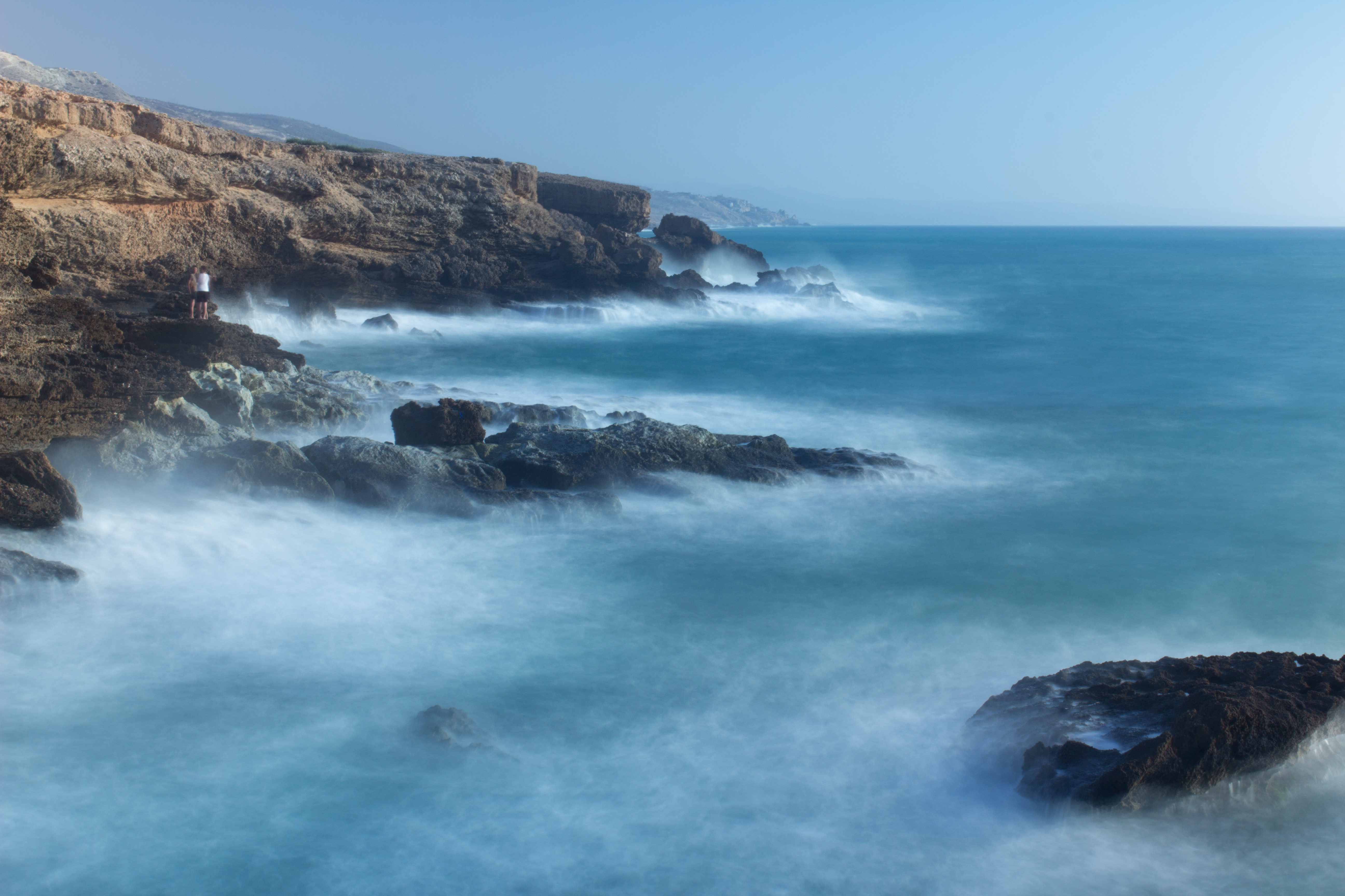 صورة على الساحل المغربي بالضفة المتوسطية بشمال المغرب منطقة الريف من أغسطس 2014 بين فترتي العصر والعشية